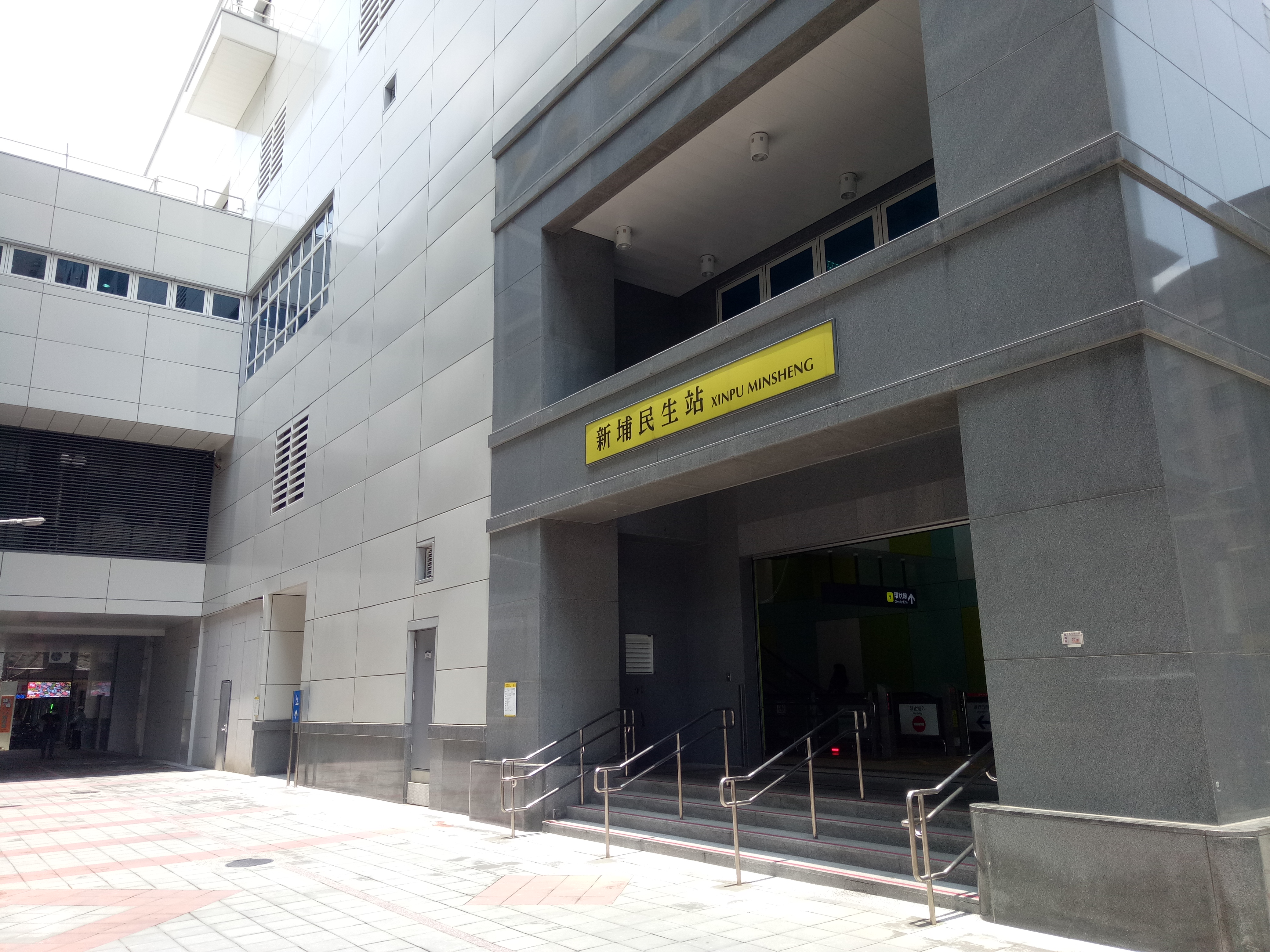 台北捷運新埔民生站出口。